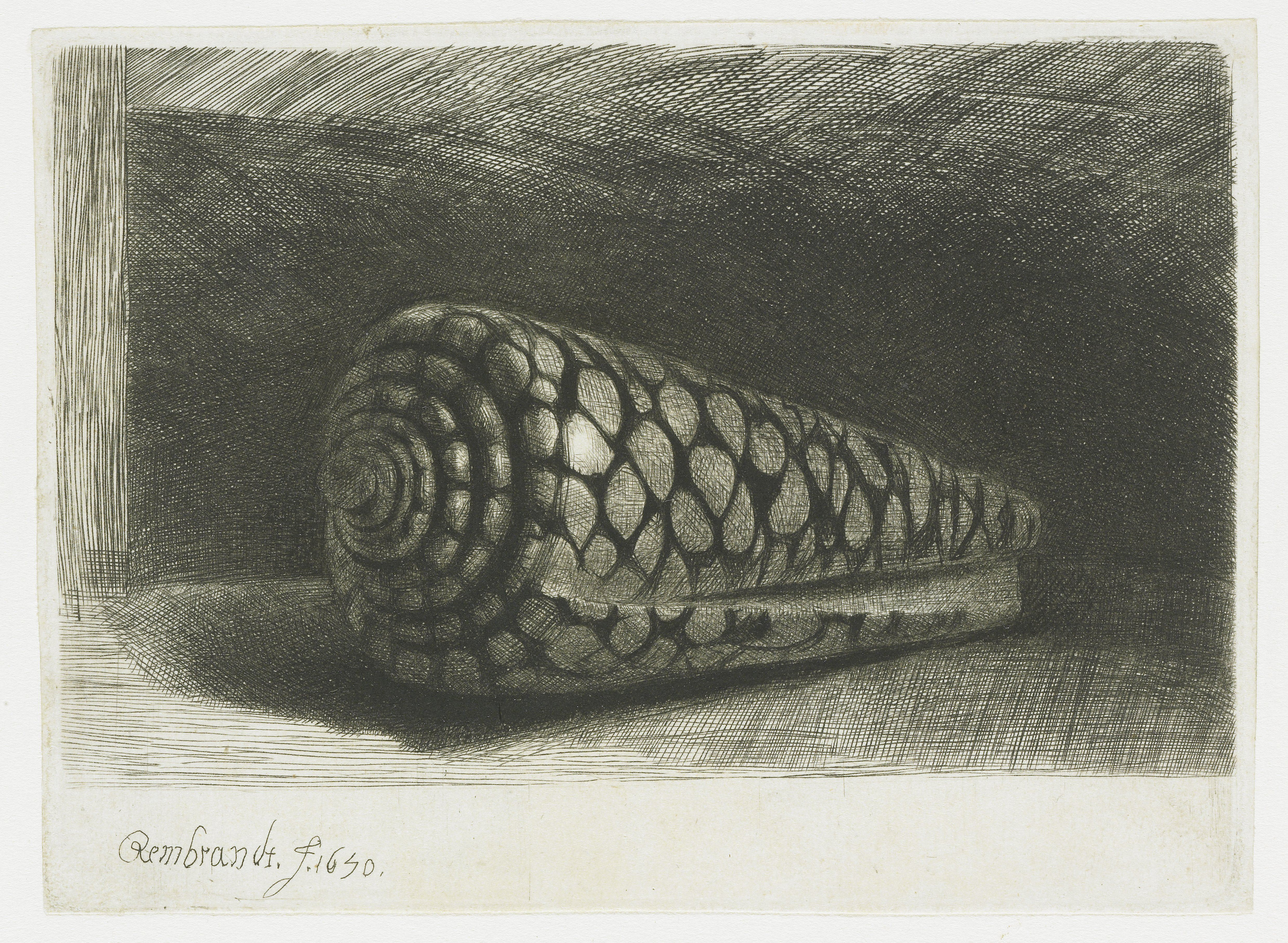 IdentificatieTitel(s): De Schelp (Conus Marmoreus)Objecttype: prent Objectnummer: RP-P-1962-63Catalogusreferentie: New Hollstein Dutch 247-3(3)Bartsch 159-3(3)Hollstein Dutch 159-3(3)Opschriften / Merken: signatuur en datum, linksonder: ‘Rembrandt f 1650’merk, verso linksonder: Lugt 2228VervaardigingVervaardiger: prentmaker: Rembrandt van Rijn (vermeld op object)naar eigen ontwerp van: Rembrandt van RijnDatering: 1650Fysieke kenmerken: ets, droge naald en burijnMateriaal: papier Techniek: etsen / droge naald / burijnAfmetingen: h 96 mm × b 132 mmOnderwerpWat: molluscs (+ shell, snail-shell etc.)Verwerving en rechtenCredit line: Legaat van de heer en mevrouw De Bruijn-van der Leeuw, Muri, ZwitserlandVerwerving: legaat 1962Copyright: Publiek domein